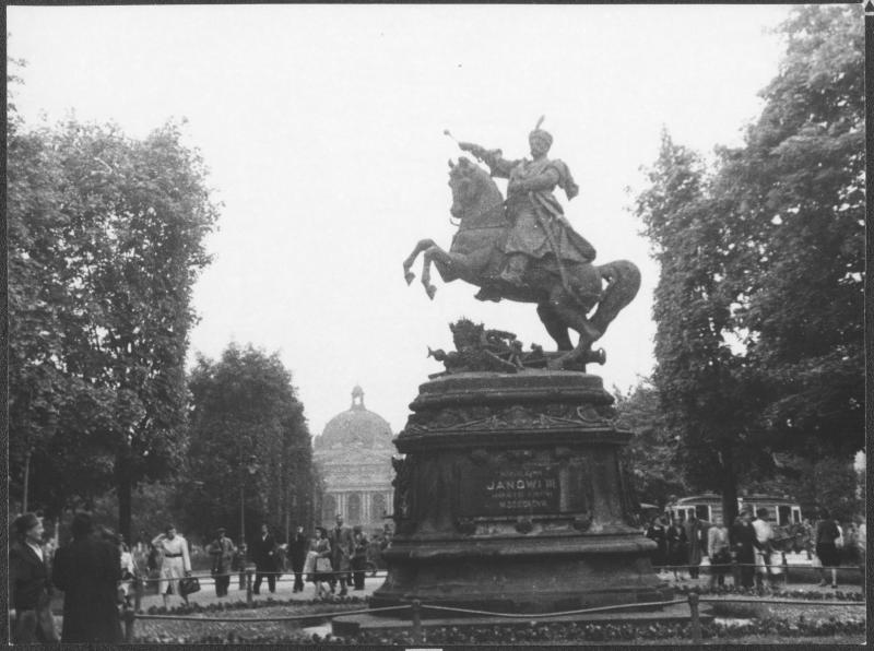 Reiterdenkmal in einem Park in Lemberg, 1943.